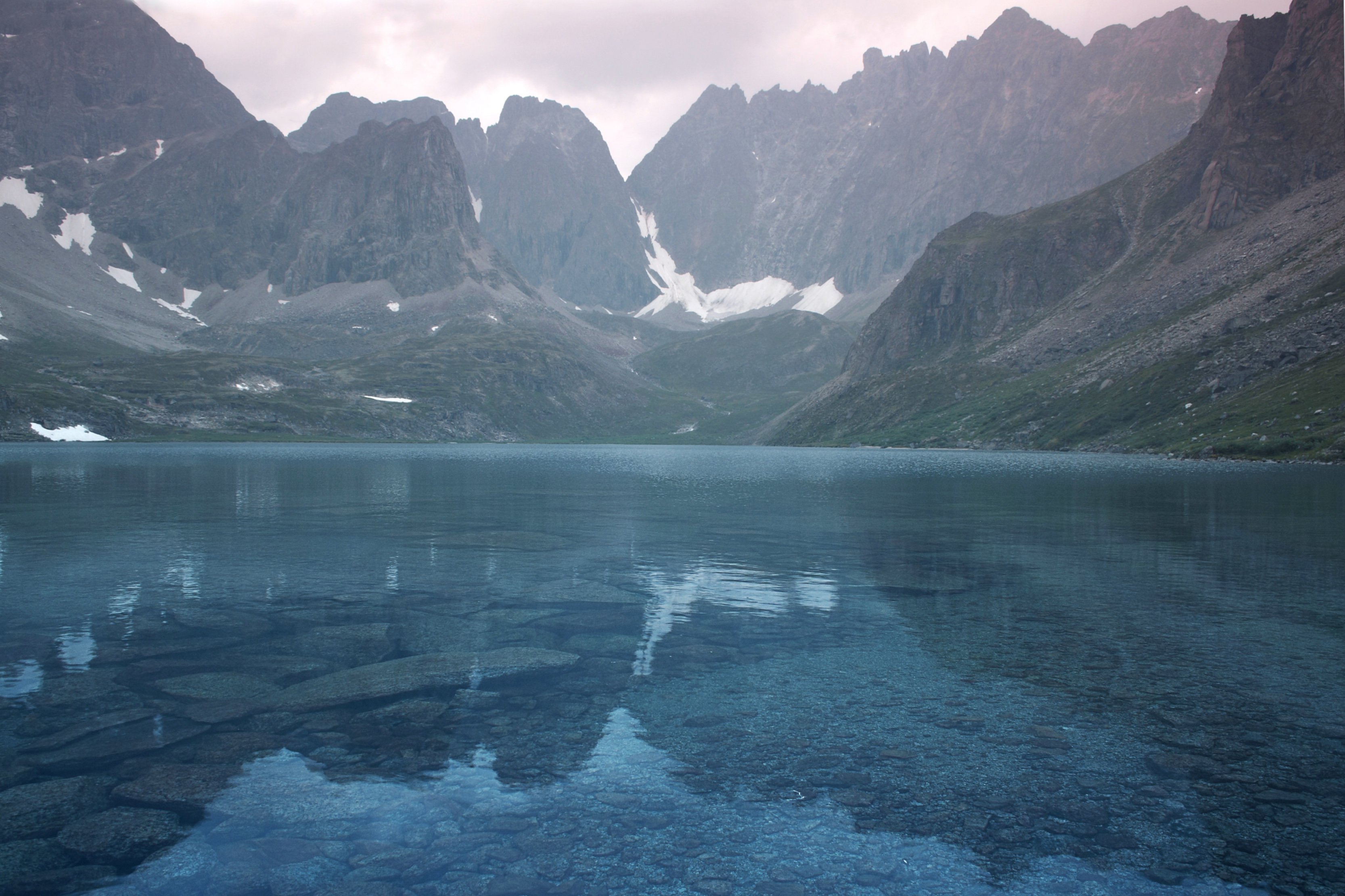 Сакуканский заказник, Каларский район This image is related to the protected area of Russia number 7510059